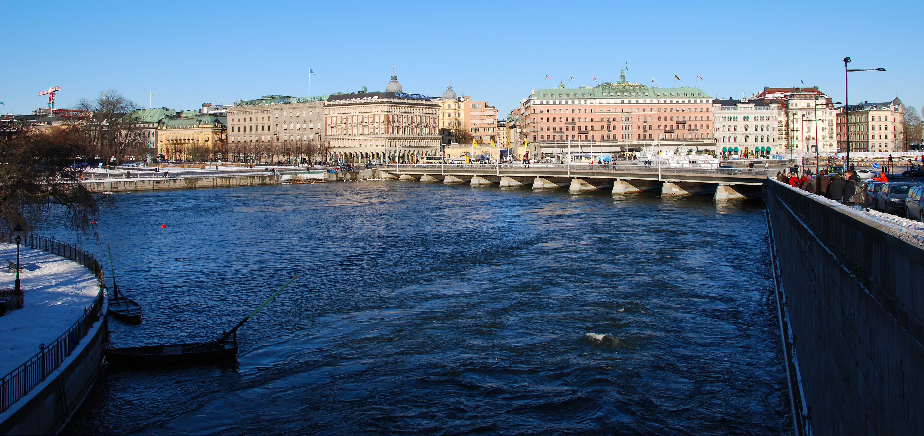 Norrström, sedd från Slottskajen i Stockholm